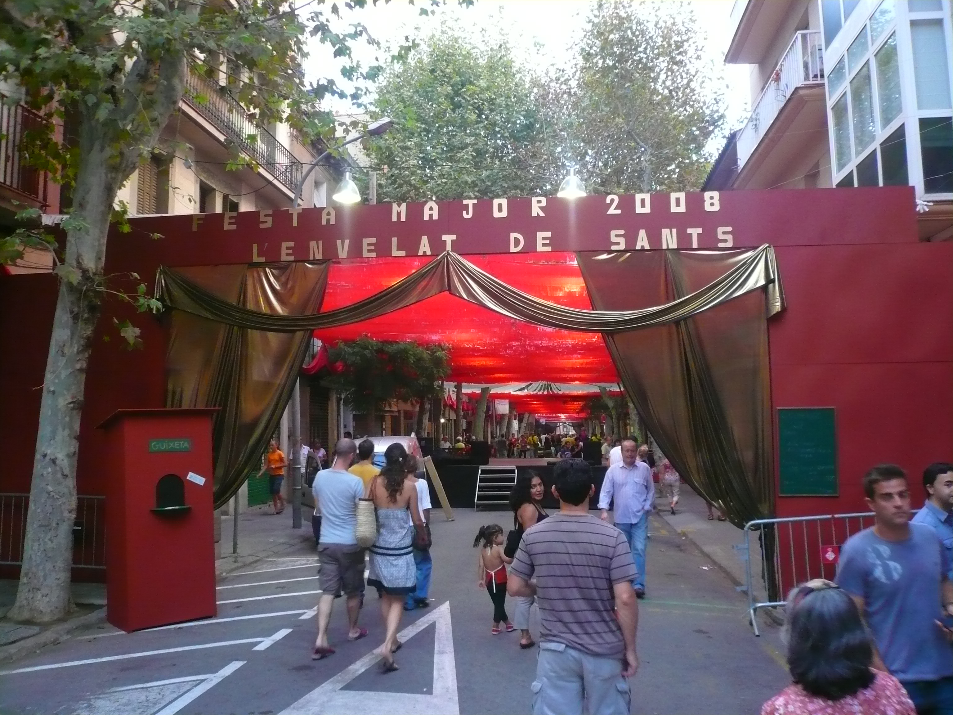 Carrers guarnits per la festa major de Sants del 2008